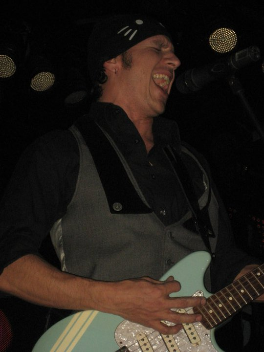 Presentacion del disco con Niña Rock